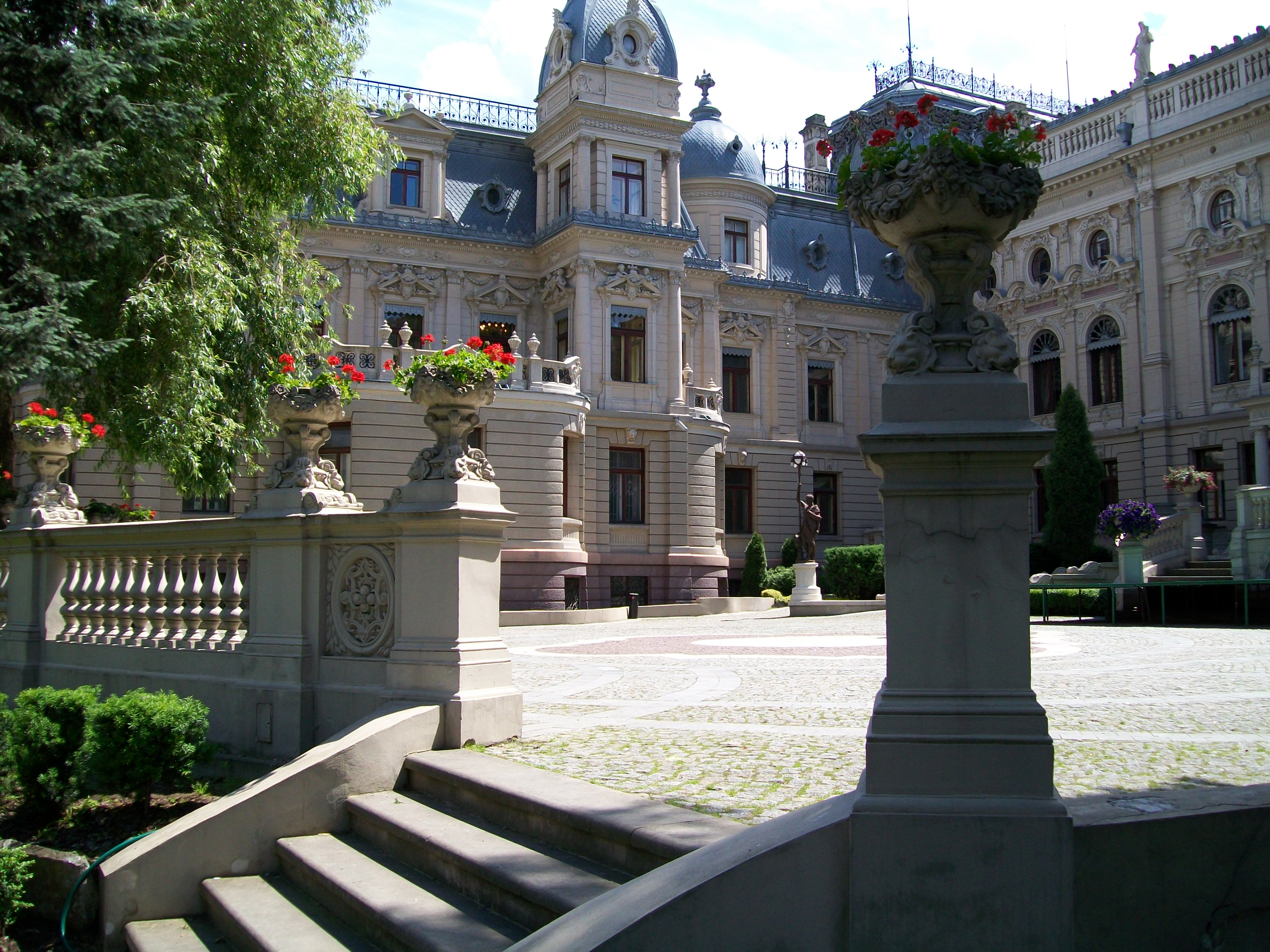 Łódź, ul. Ogrodowa 15